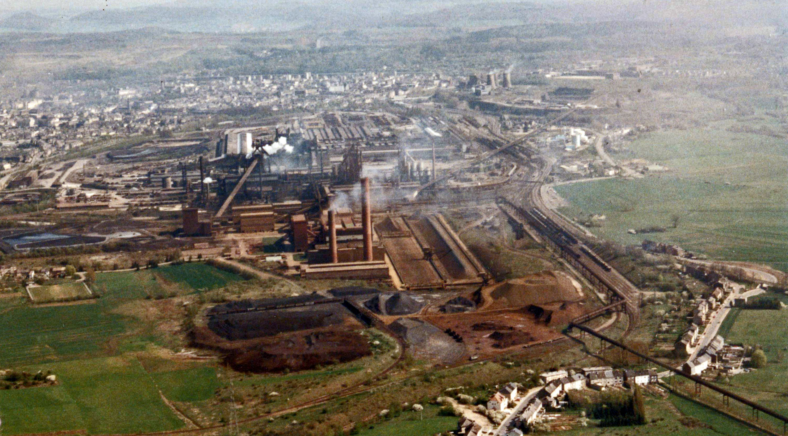 L'Arbed sur le site d'Esch-Belval (Luxembourg), en avril 1991.